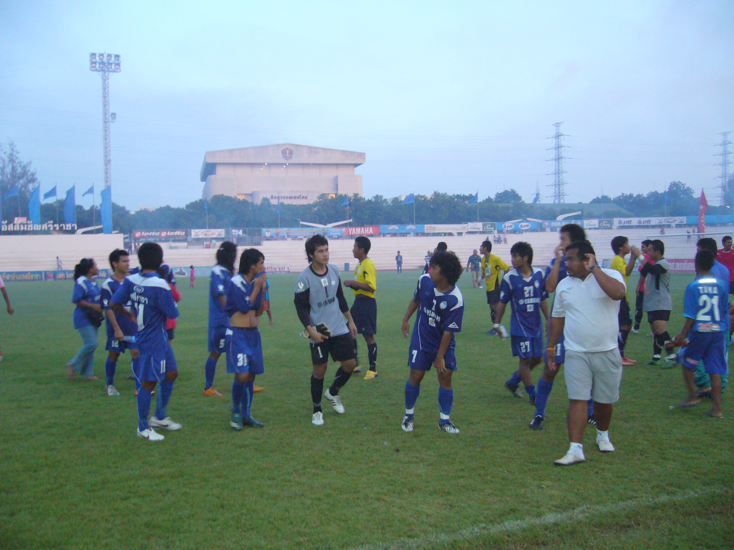 FC Sriracha